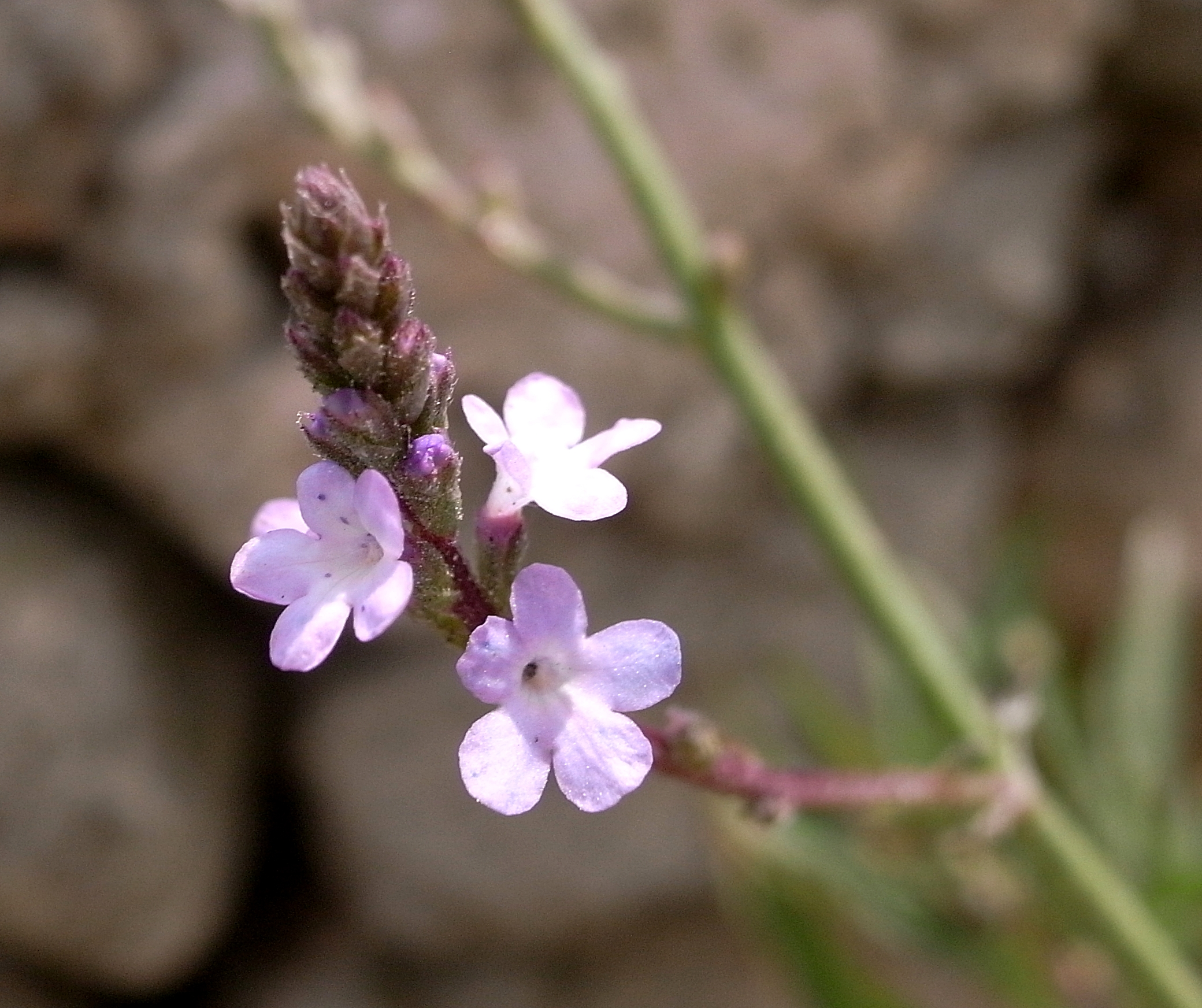 Verbena officinalis, Dingli Cliffs, Malta